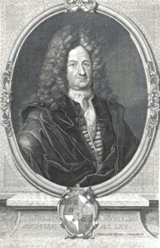 Bild Johann Philipp Wurzelbau (1651–1725)